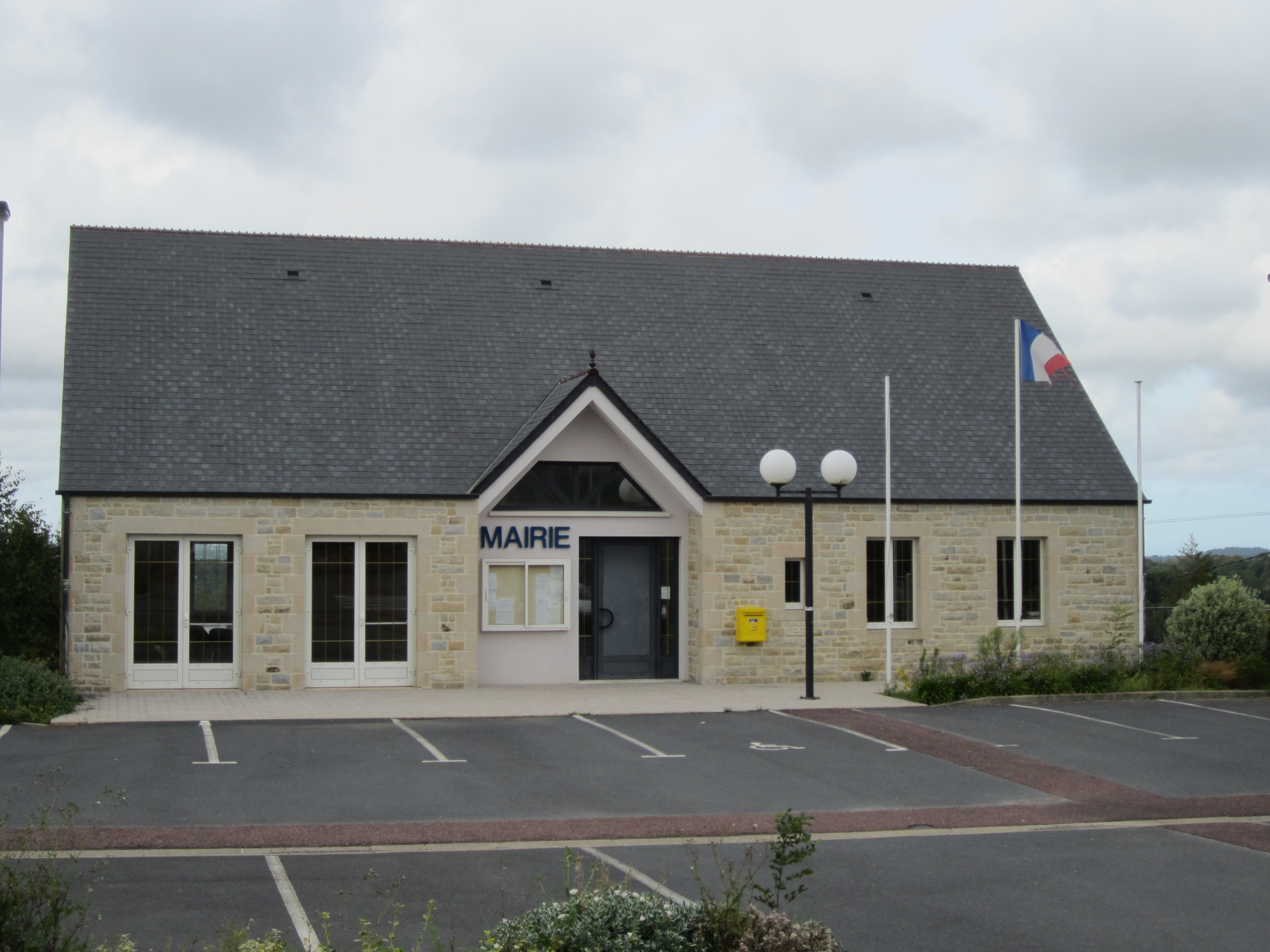 Bricquebosq